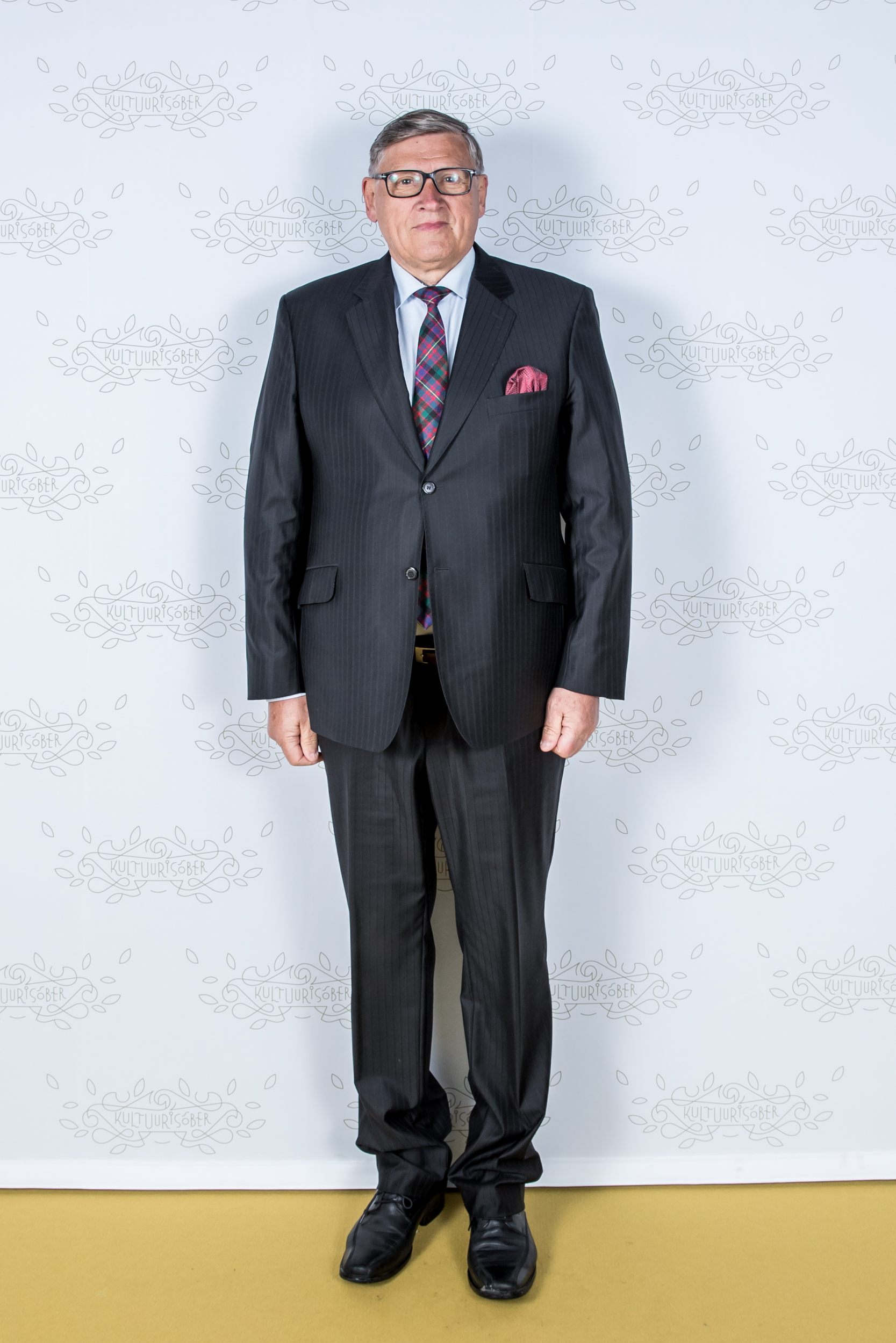 Tõnis Kaasik, Eesti ettevõtja